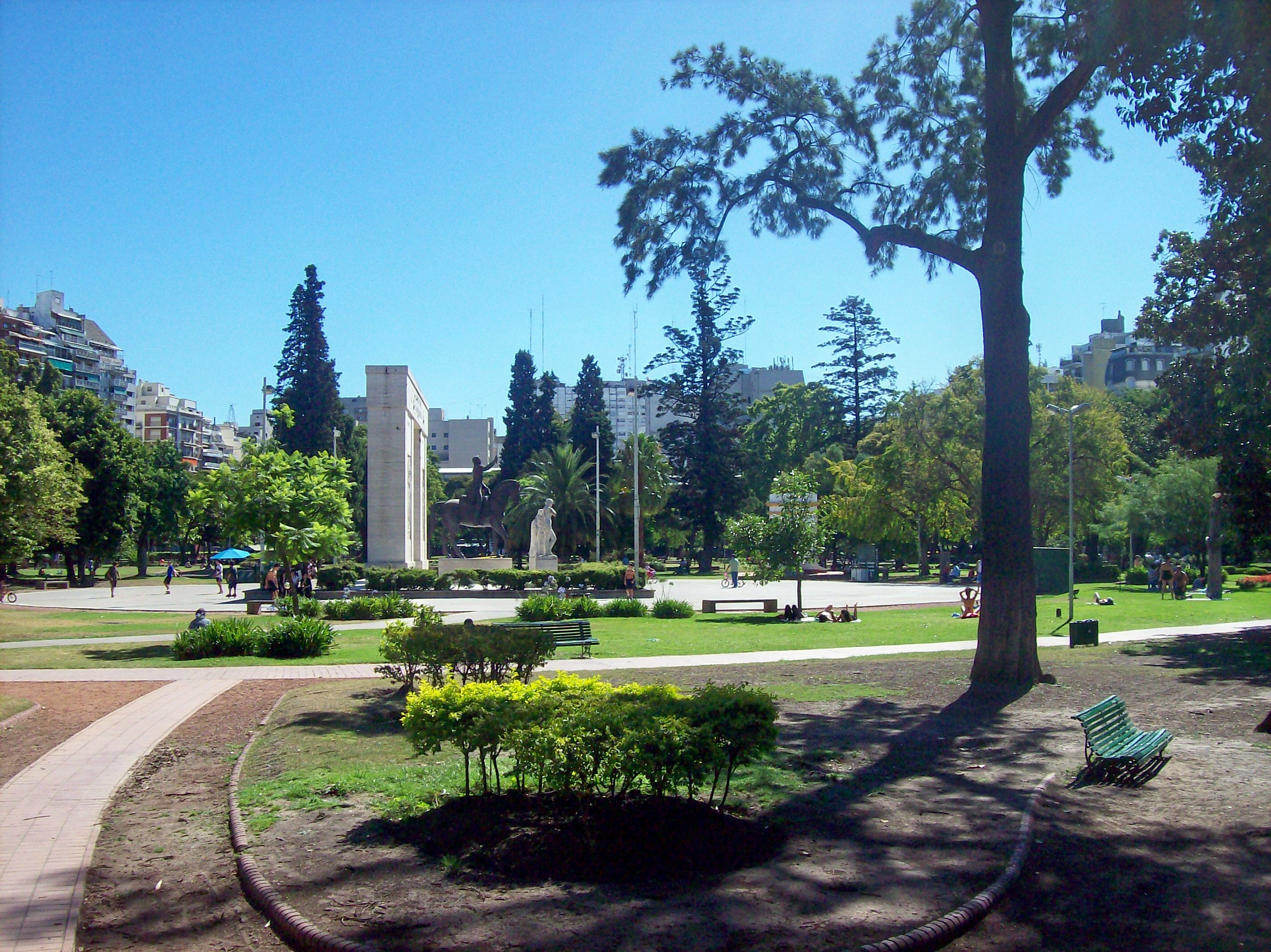 Monumento a Simón Bolívar, ubicado en el Parque Rivadavia de la Ciudad de Buenos Aires. Al costado se ve el bajorrelieve "Juramento" y la estatua "La Inspiración".